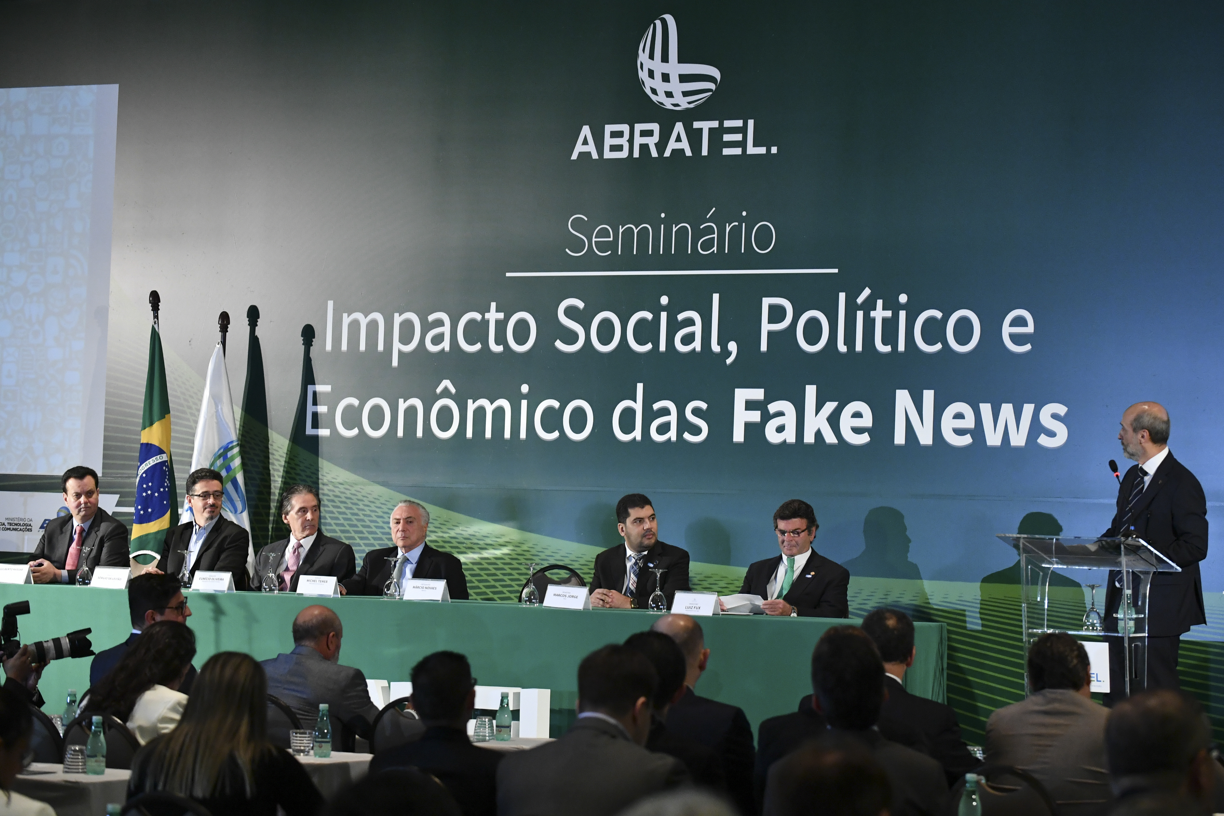 Presidente do Senado Federal, senador Eunício Oliveira (MDB-CE), participa da entrega do Prêmio Abratel de Comunicação 2018 durante abertura do seminário "O Impacto Social, Político e Econômico das Fake News", promovido pela Associação Brasileira de Rádio e Televisão (Abratel). O presidente do Senado é homenageado representando o Senado Federal. Em discurso, presidente da Associação Brasileira de Rádio e Televisão (Abratel), Márcio Novaes. Participam: ministro da Ciência, Tecnologia, Inovações e Telecomunicações (MCTIC), Gilberto Kassab; presidente do Senado Federal, senador Eunício Oliveira (PMDB-CE); presidente da República, Michel Temer; ministro da Indústria, Comércio Exterior e Serviços, Marcos Jorge; presidente do Tribunal Superior Eleitoral (TSE), ministro Luiz Fux. Foto: Marcos Brandão/Senado Federal